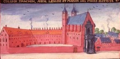 Ancien collège jésuite d'Anchin à Douai. (miniature tirée du cartulaire de Douai)